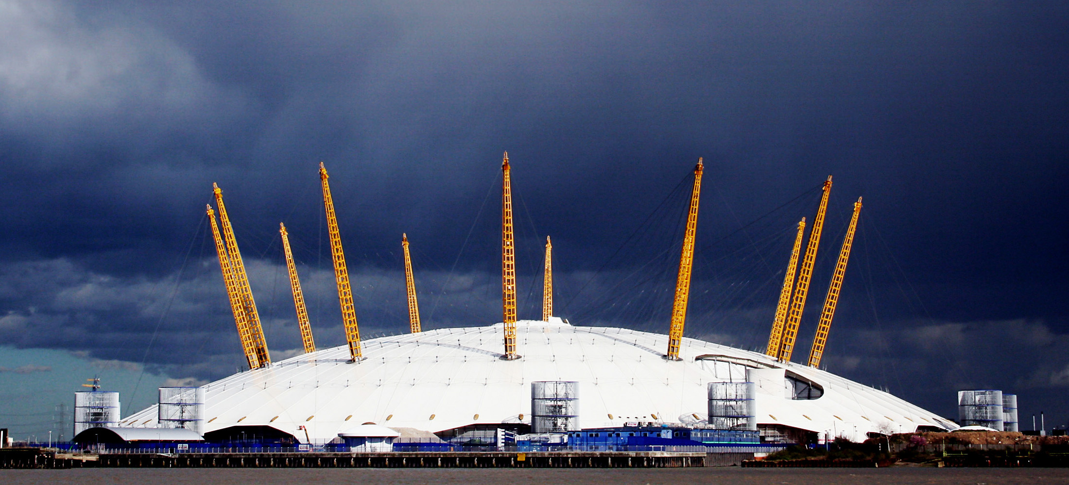 Millennium Dome, London